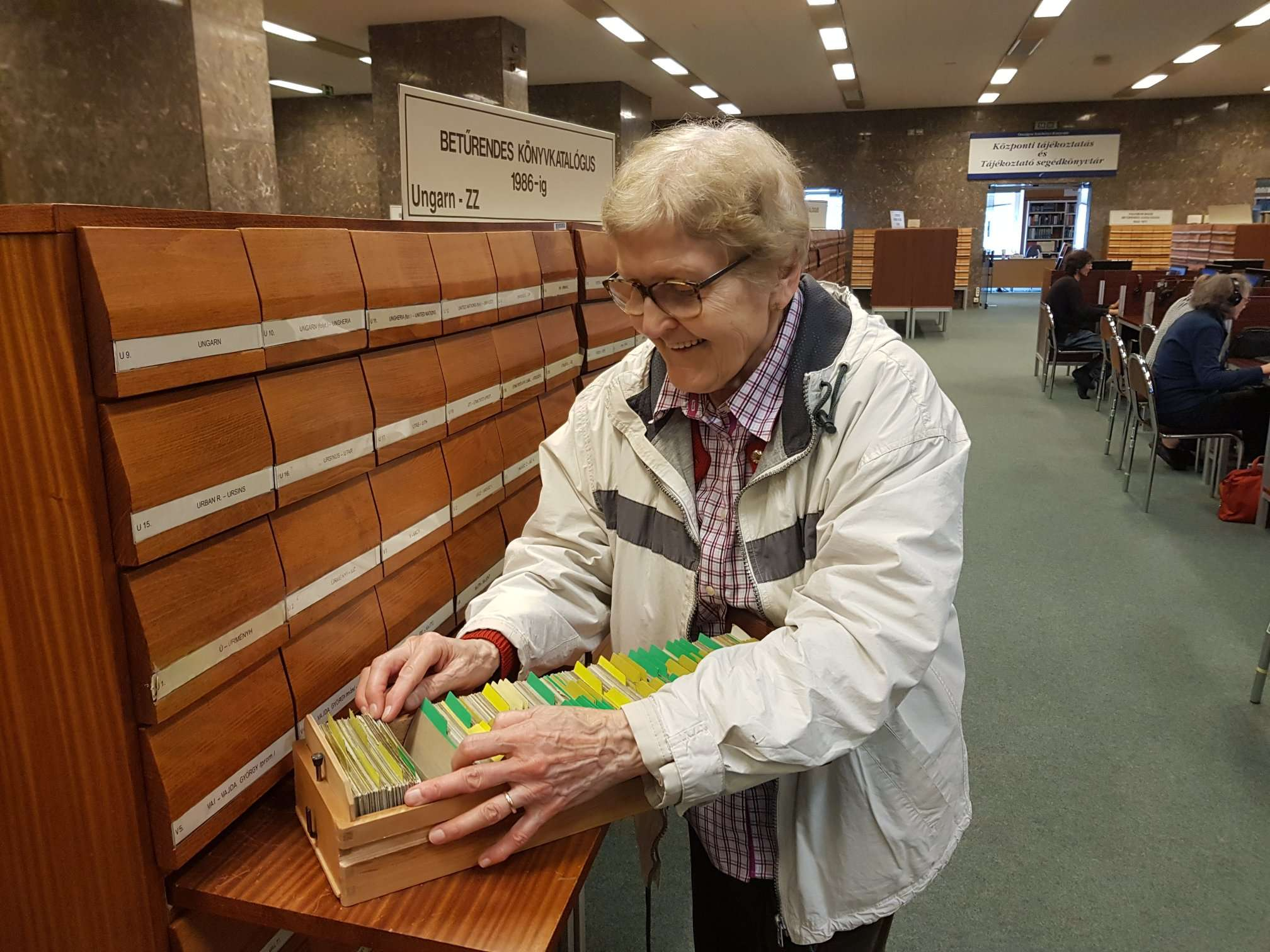 A könyvrárban